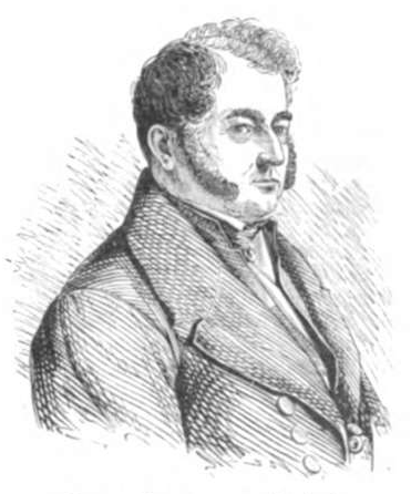 Rector Baumgarten-Crusius.